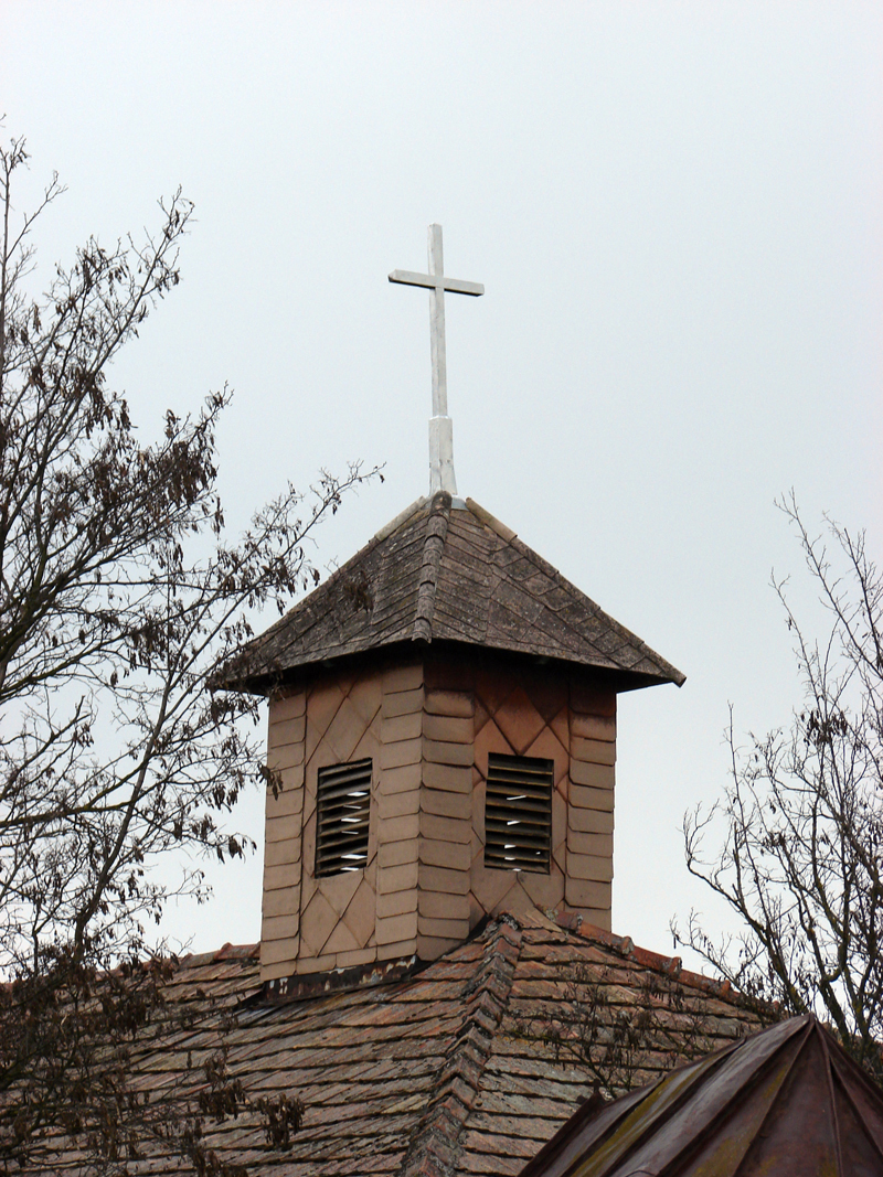 Felsőerek (Szakmár, Bács-Kiskun megye)